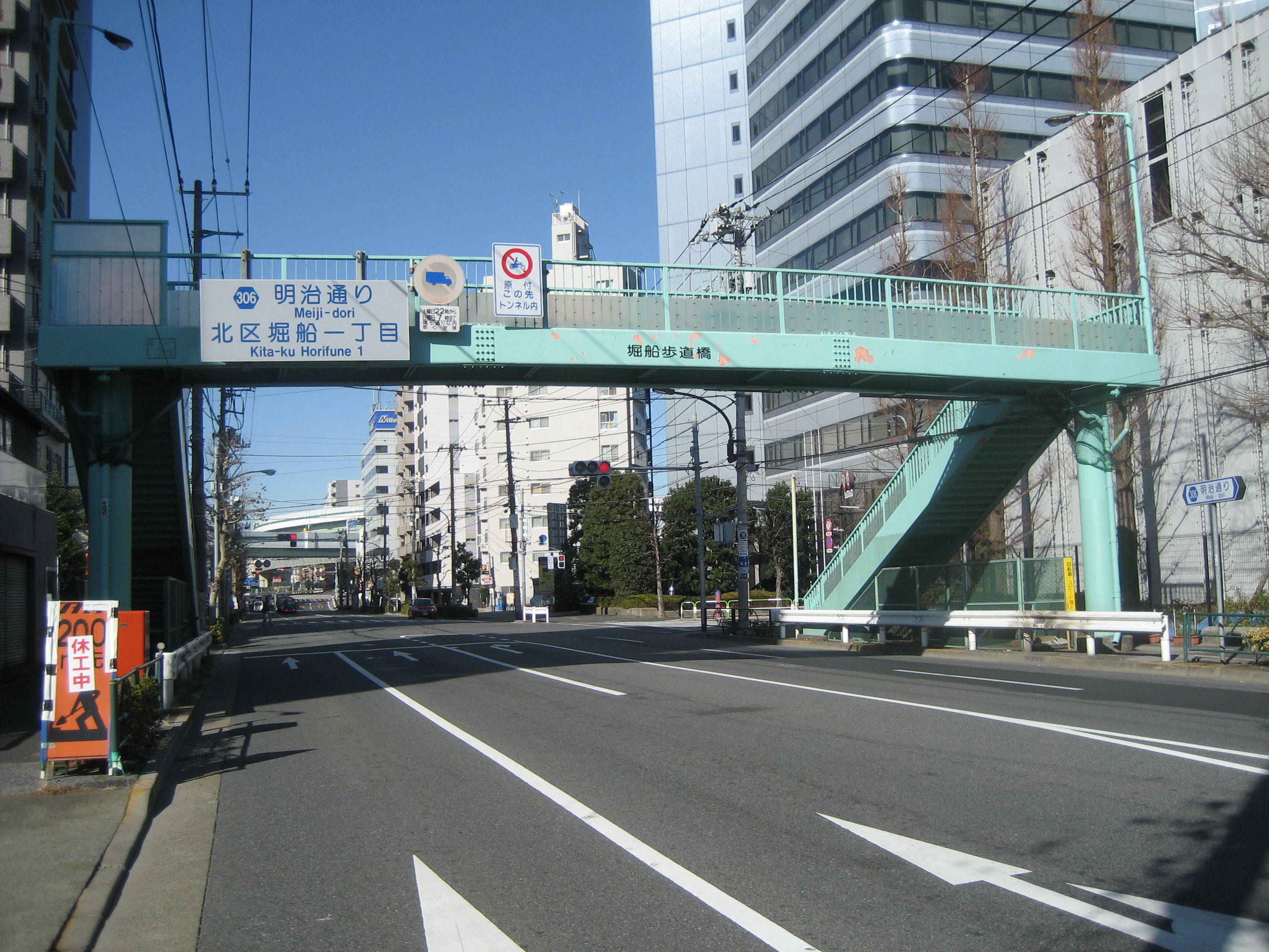 都道306号線明治通り北区堀船一丁目付近（王子方面を撮影）